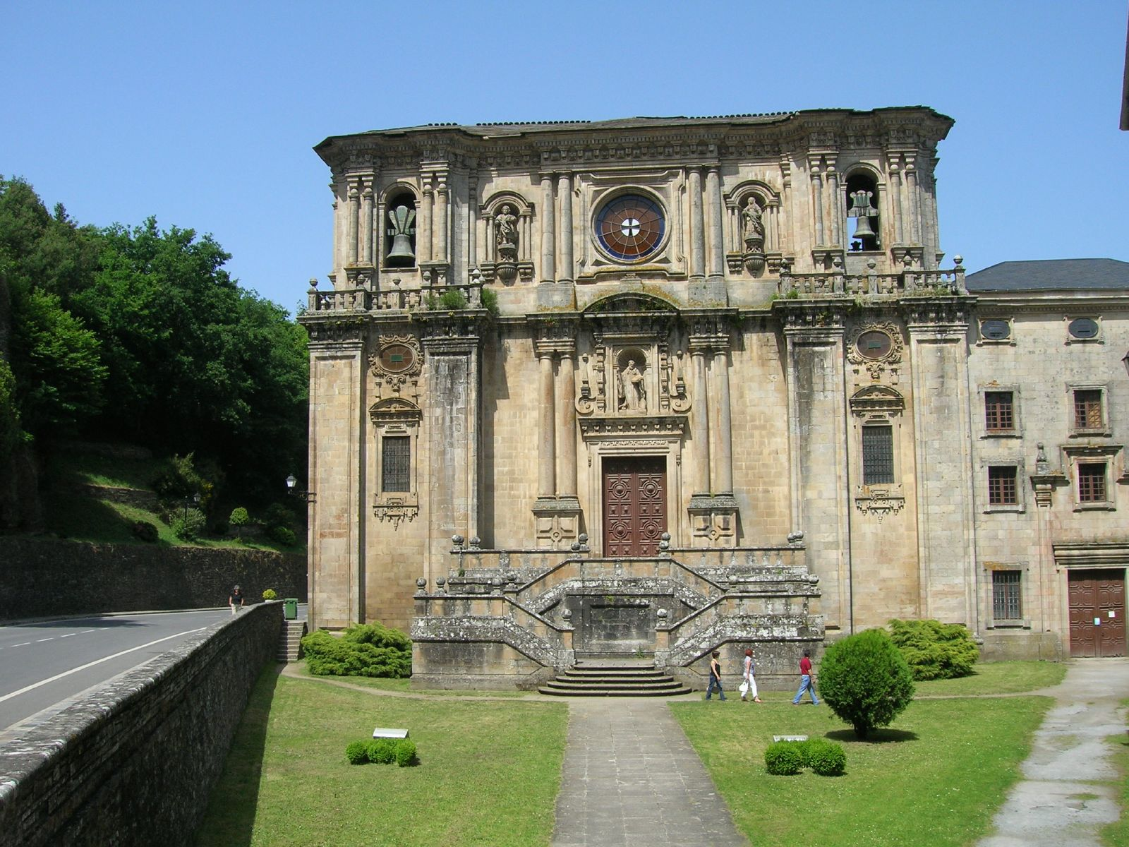 Mosteiro de San Xulián de Samos, Samos, Galicia - Spain'Monasterio de San Xulián de Samos'